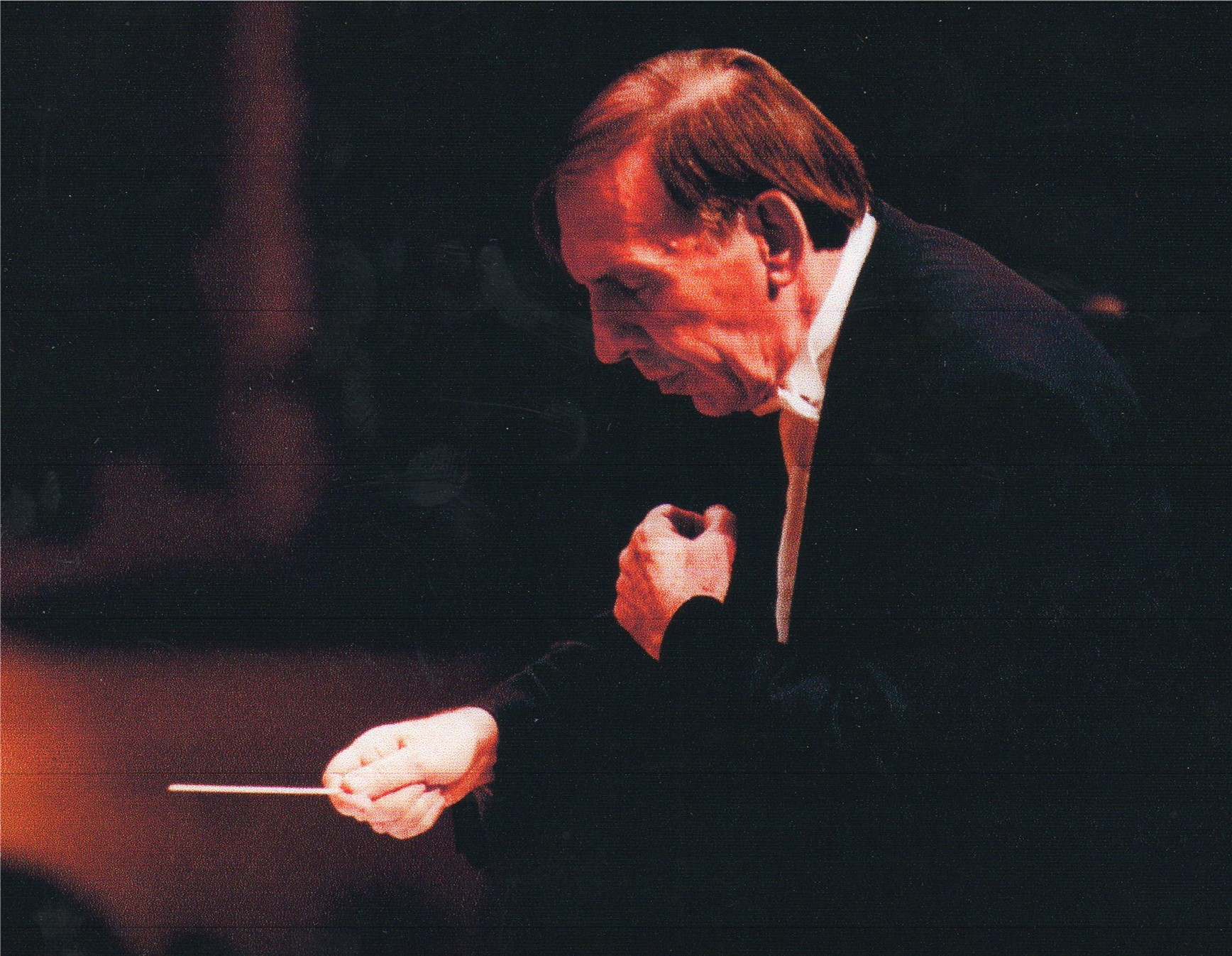 Italia